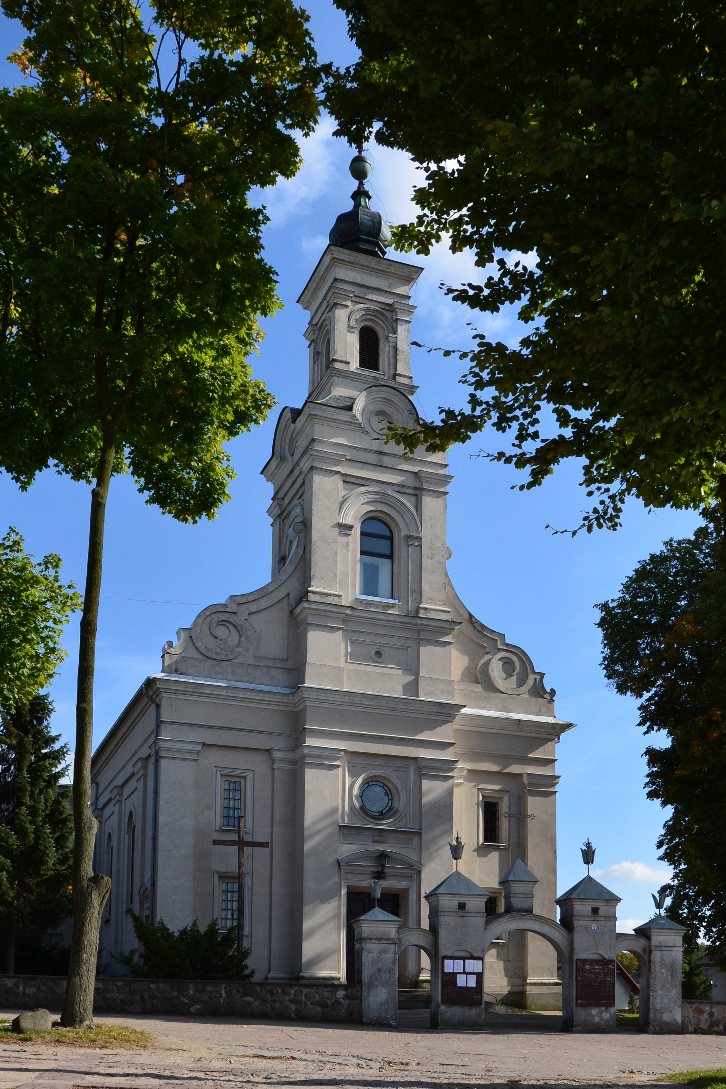 Świedziebnia, zespół kościoła par. pw. Podwyższenia Krzyża Św.